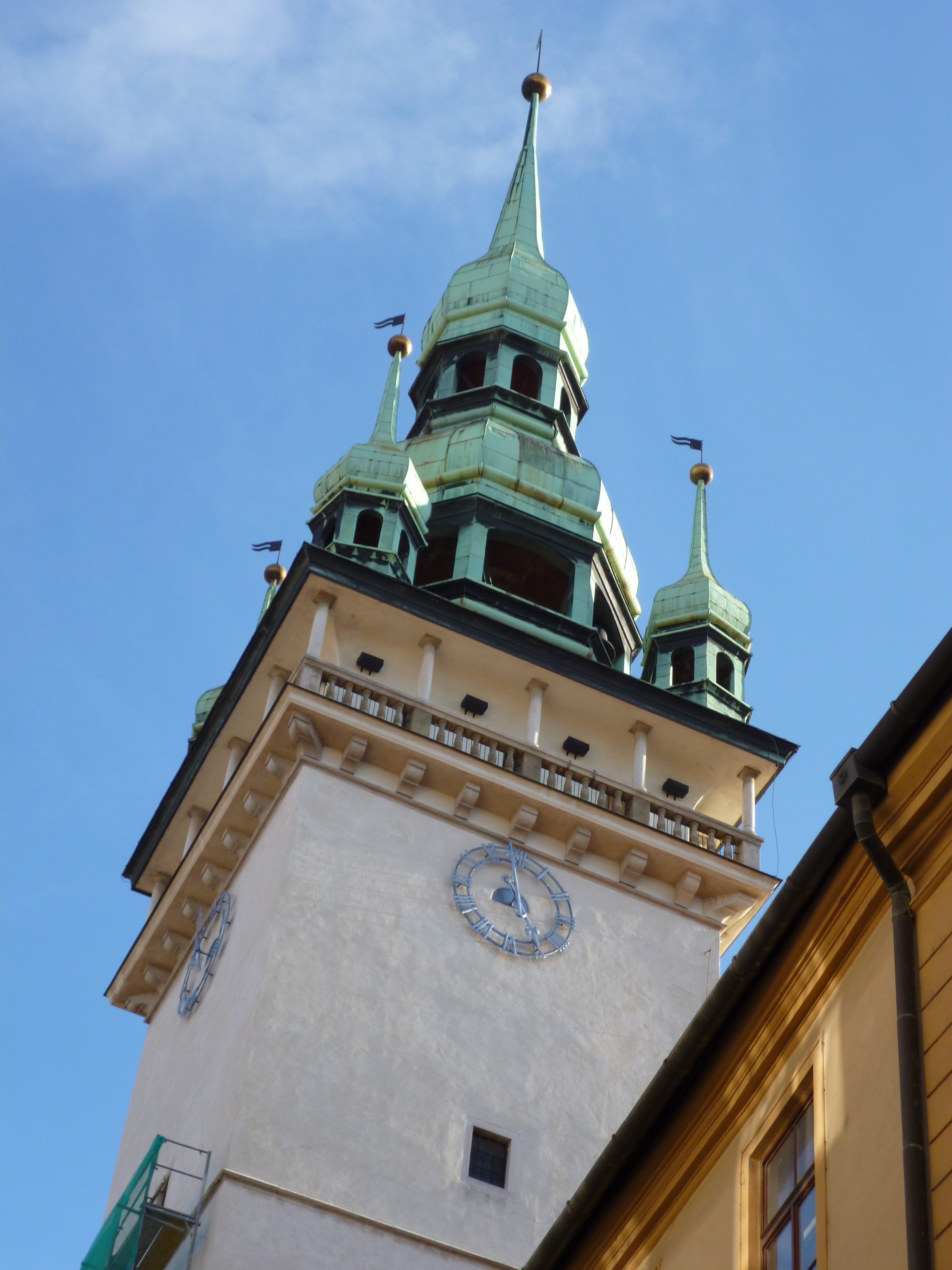 Radnice - Stará radnice (Brno), Brno - město, Radnická 368/8, Brno